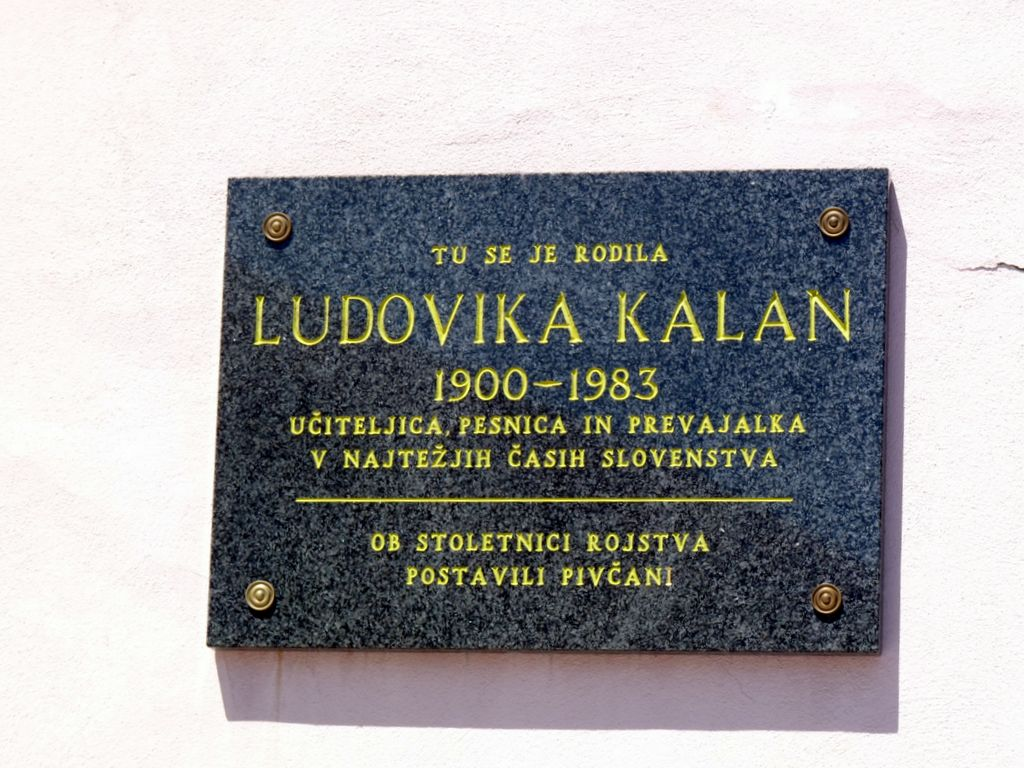 Obeležje na rojstni hiši Ludovike Kalan